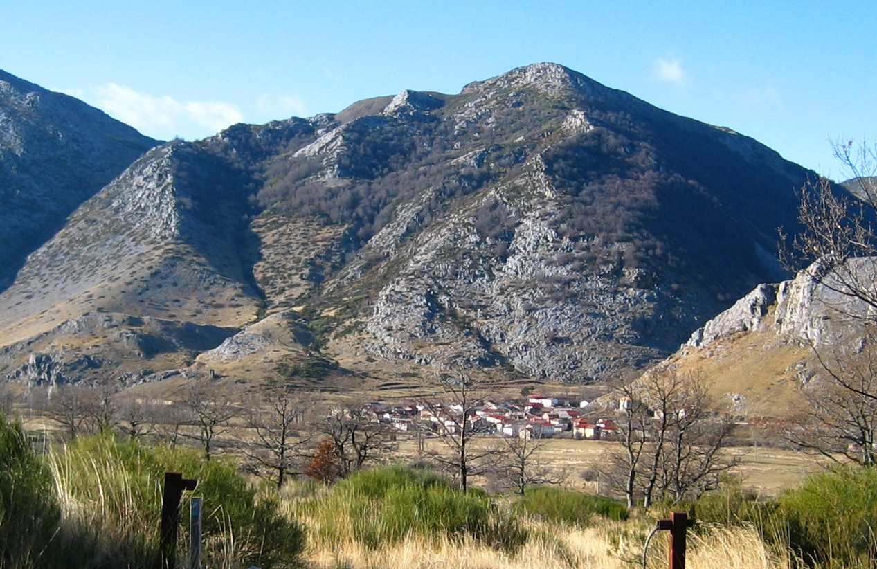 Besande desde la falda de Arbillos. Montaña "El Kado", mitad superior dcha: antigua explotacion minera de antracita, "La Rebelde".